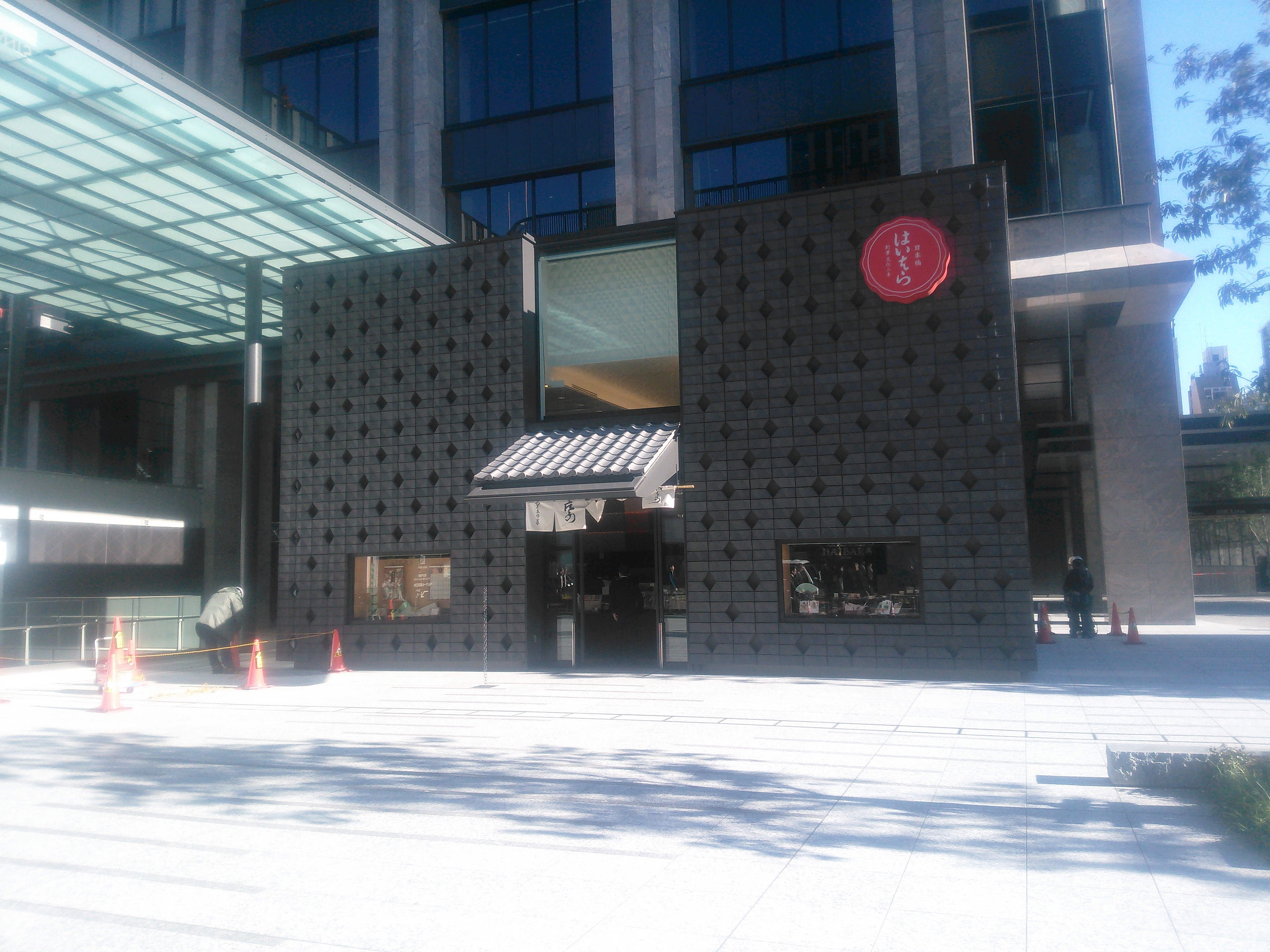 東京・日本橋、和紙商ja:榛原 (和紙舗)｜榛原本店